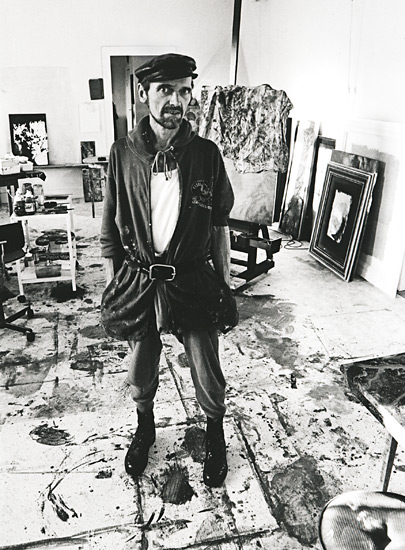 Jean Voigt i sit atelier, på herregården Rosenlund på Lolland ca. 1993